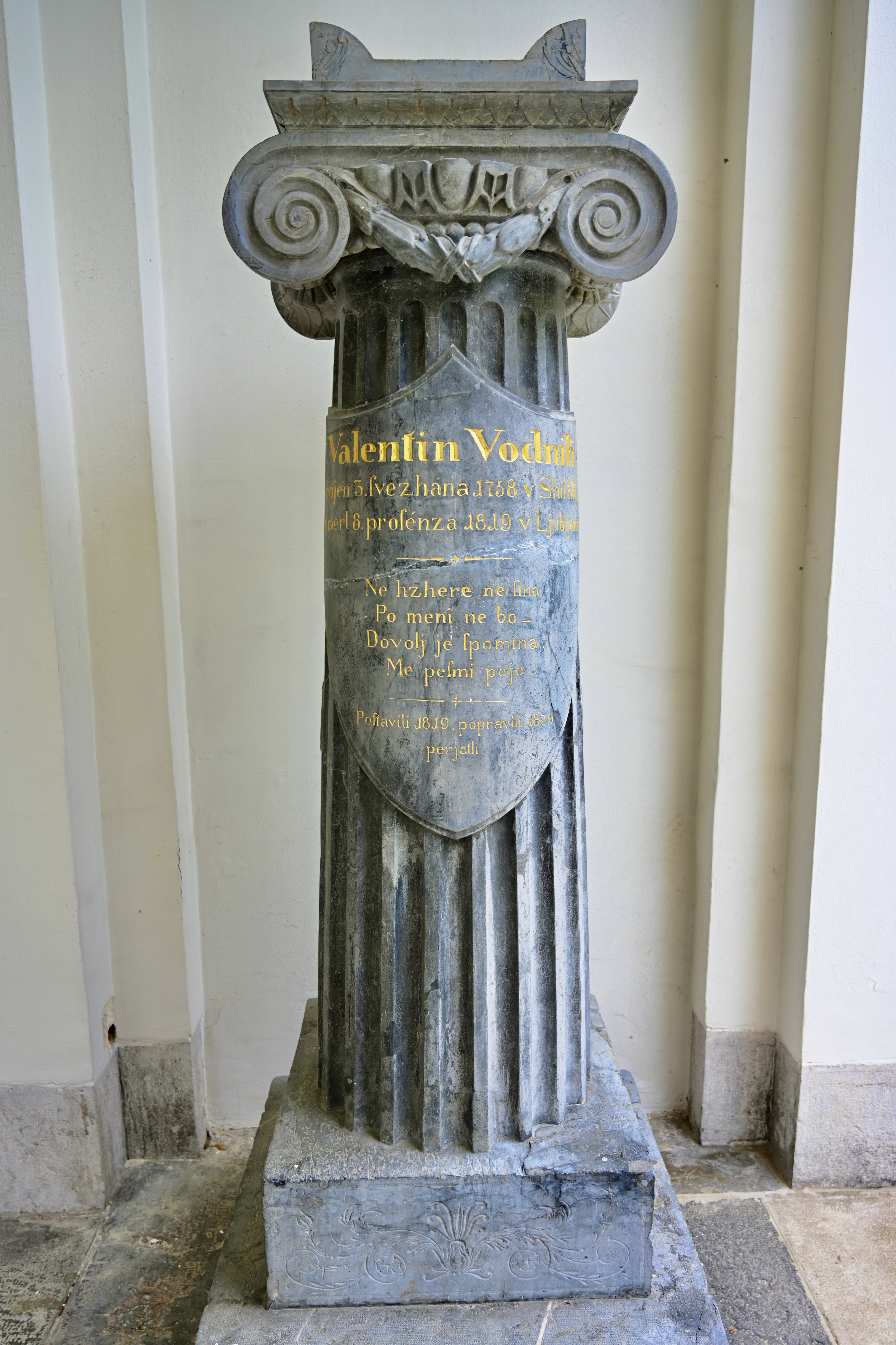 Nagrobnik slovenskega pesnika Valentina Vodnika na ljubljanskem Navju